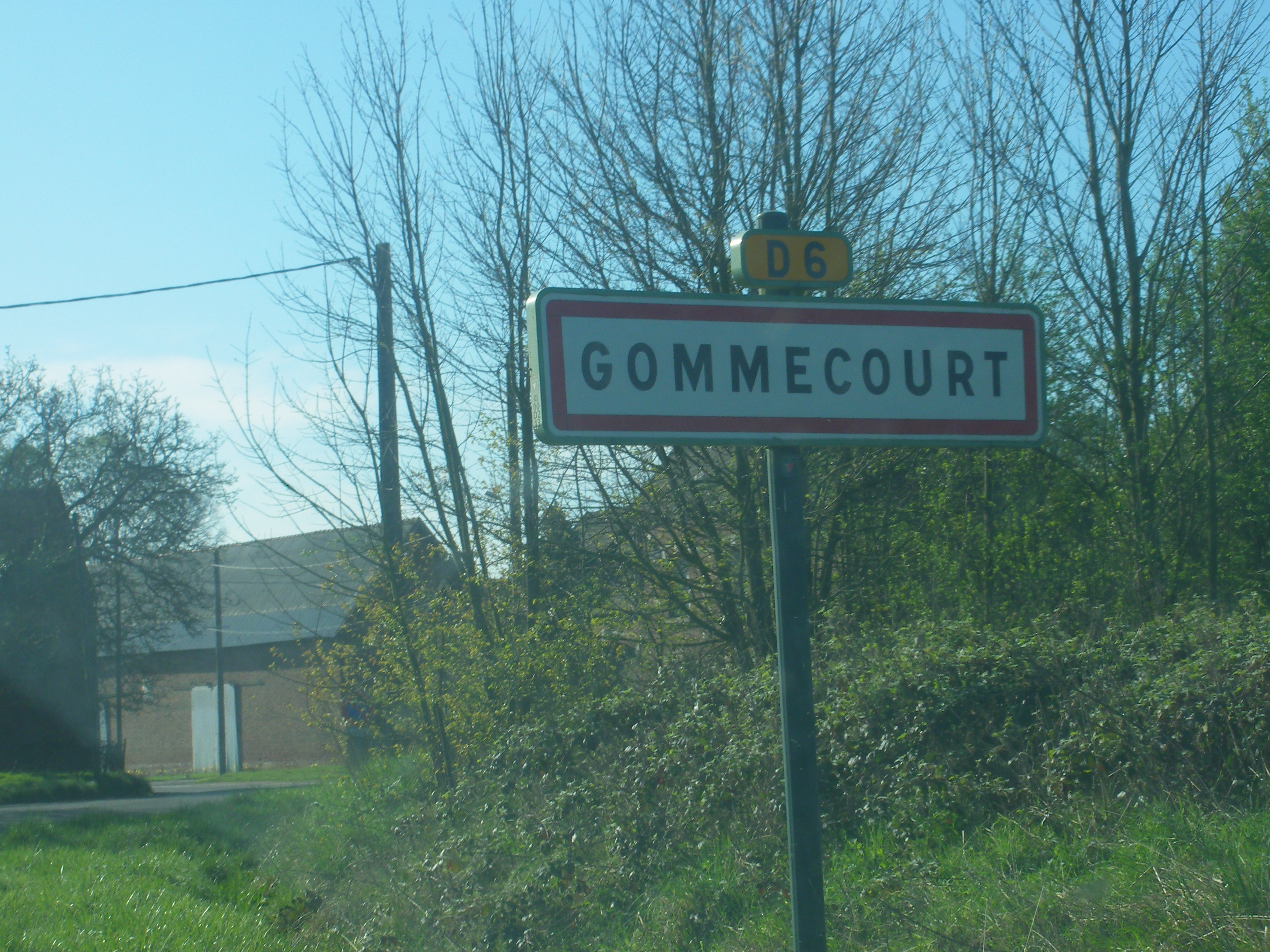 Une entrée de la commune de Gommecourt (62).